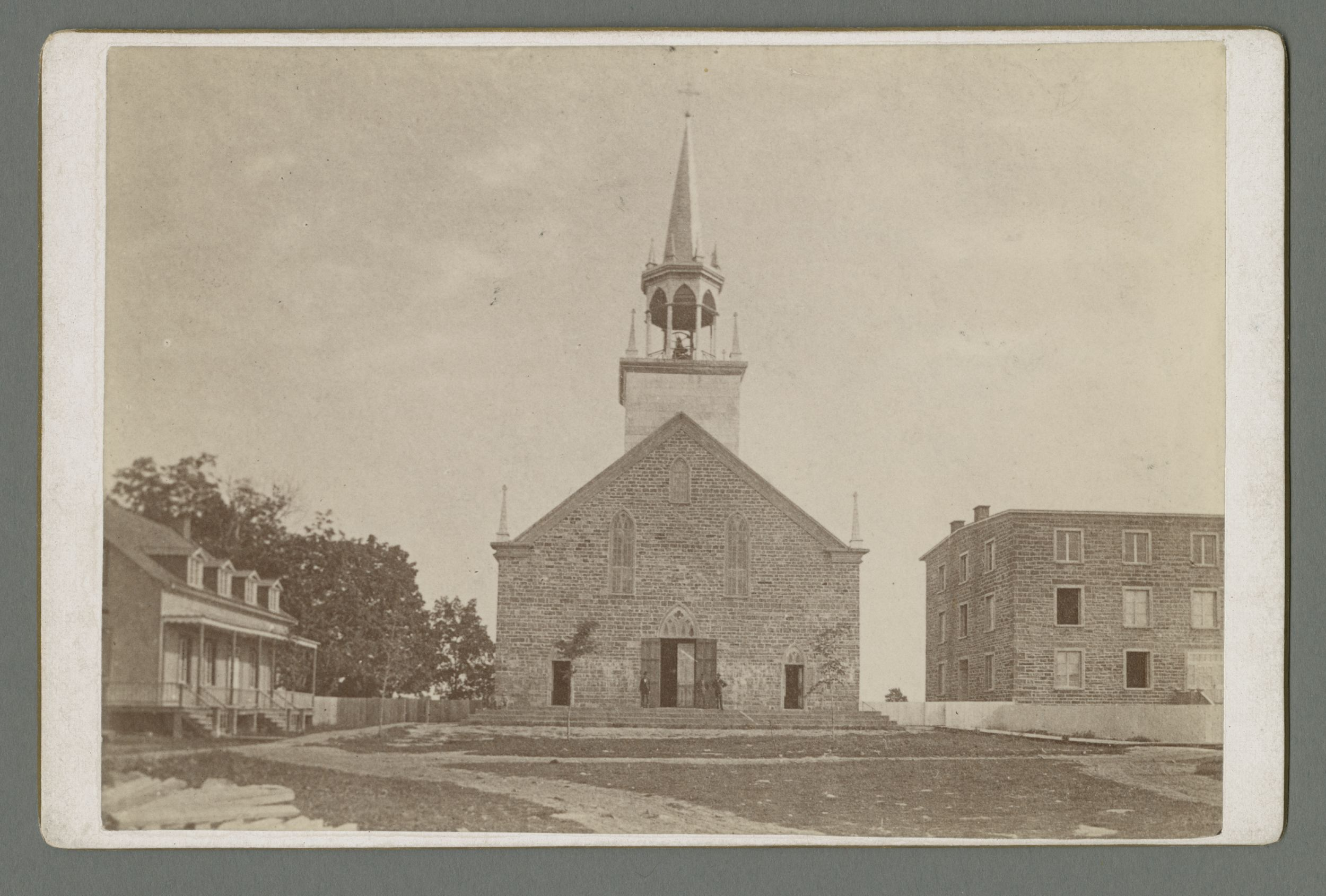 1ere eglise valleyfield